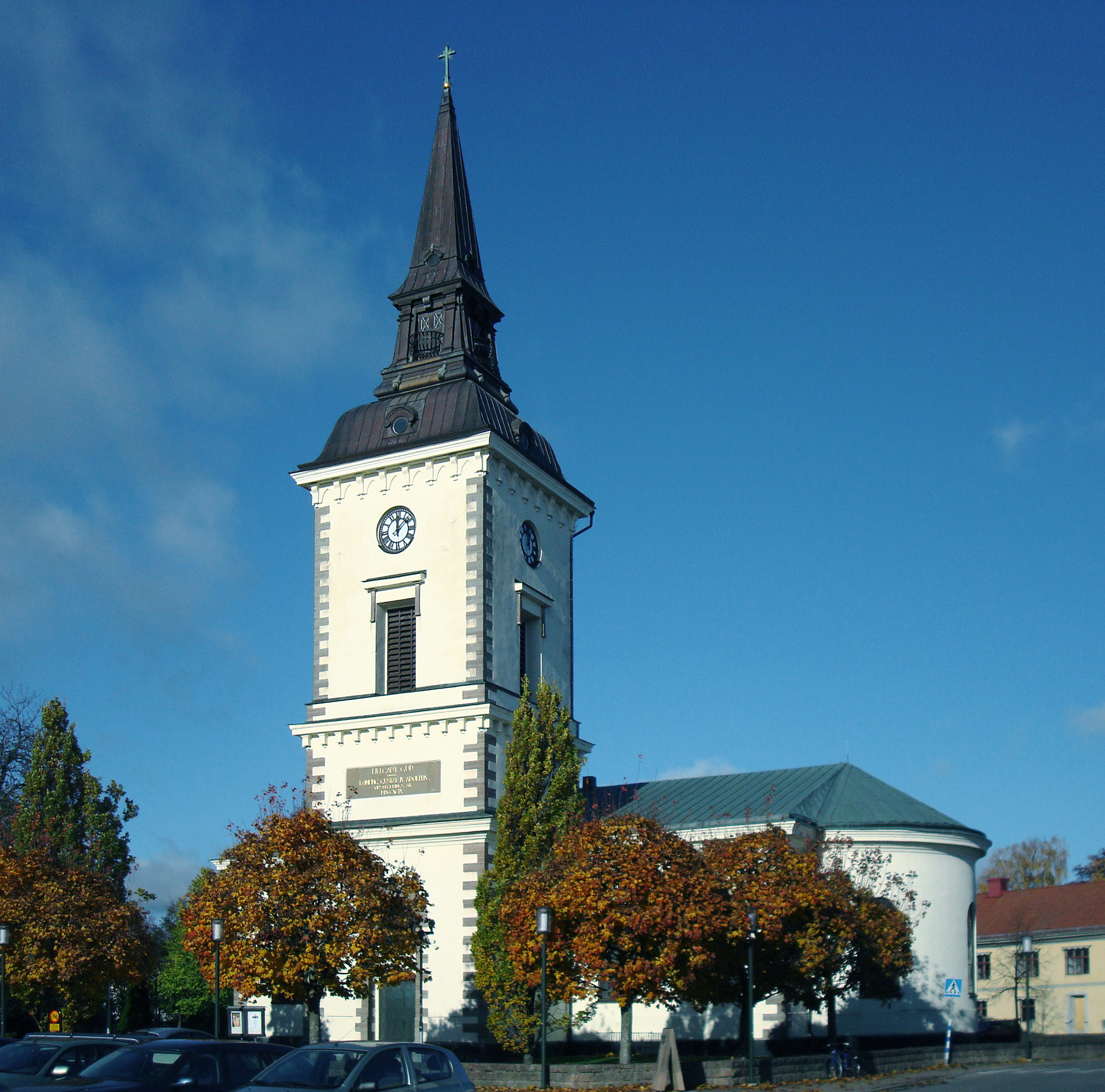 Hjos kyrka